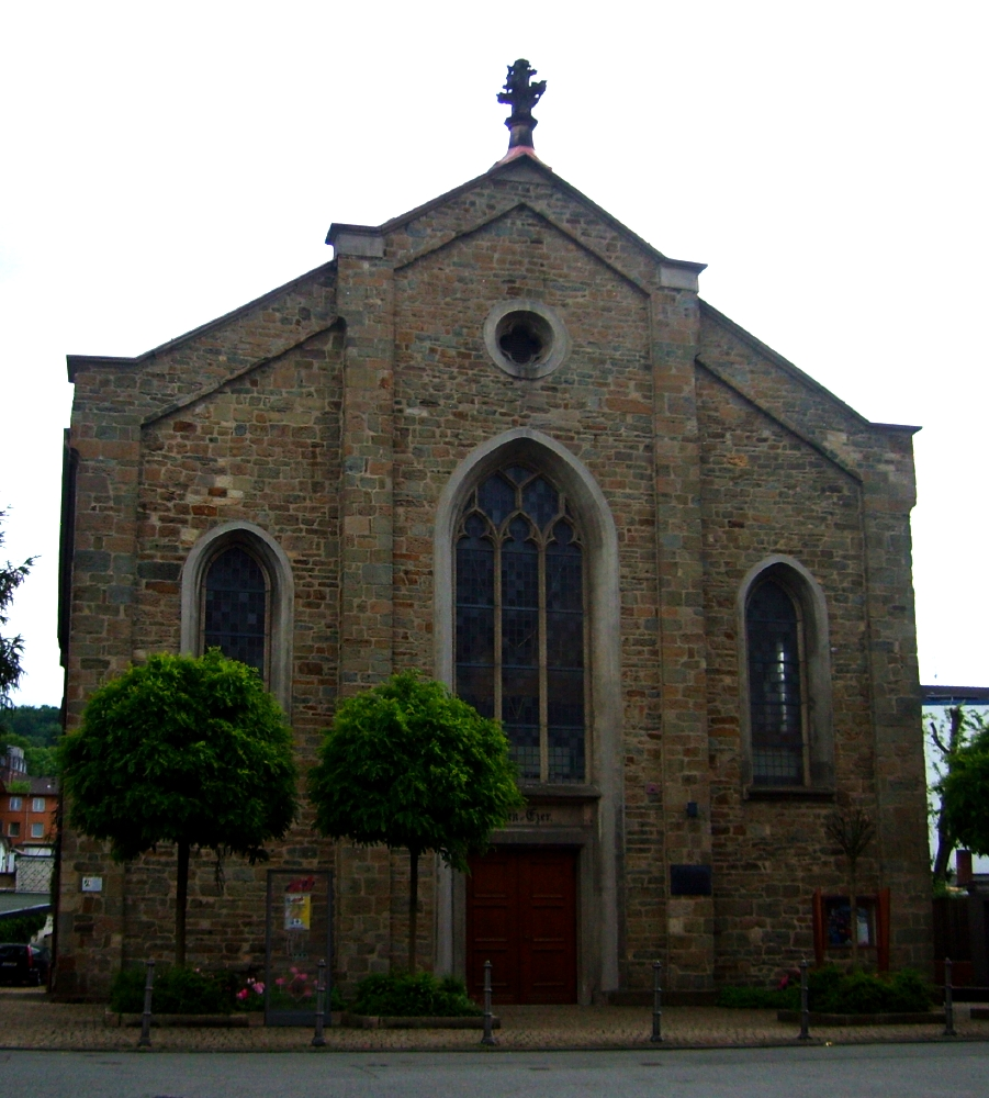 Eben-Ezer-Kapelle („Köbners Kirche“), Wuppertal-Barmen, Germany; Erbaut 1855/56, Zerstörung 1943, Wiederaufbau 1953